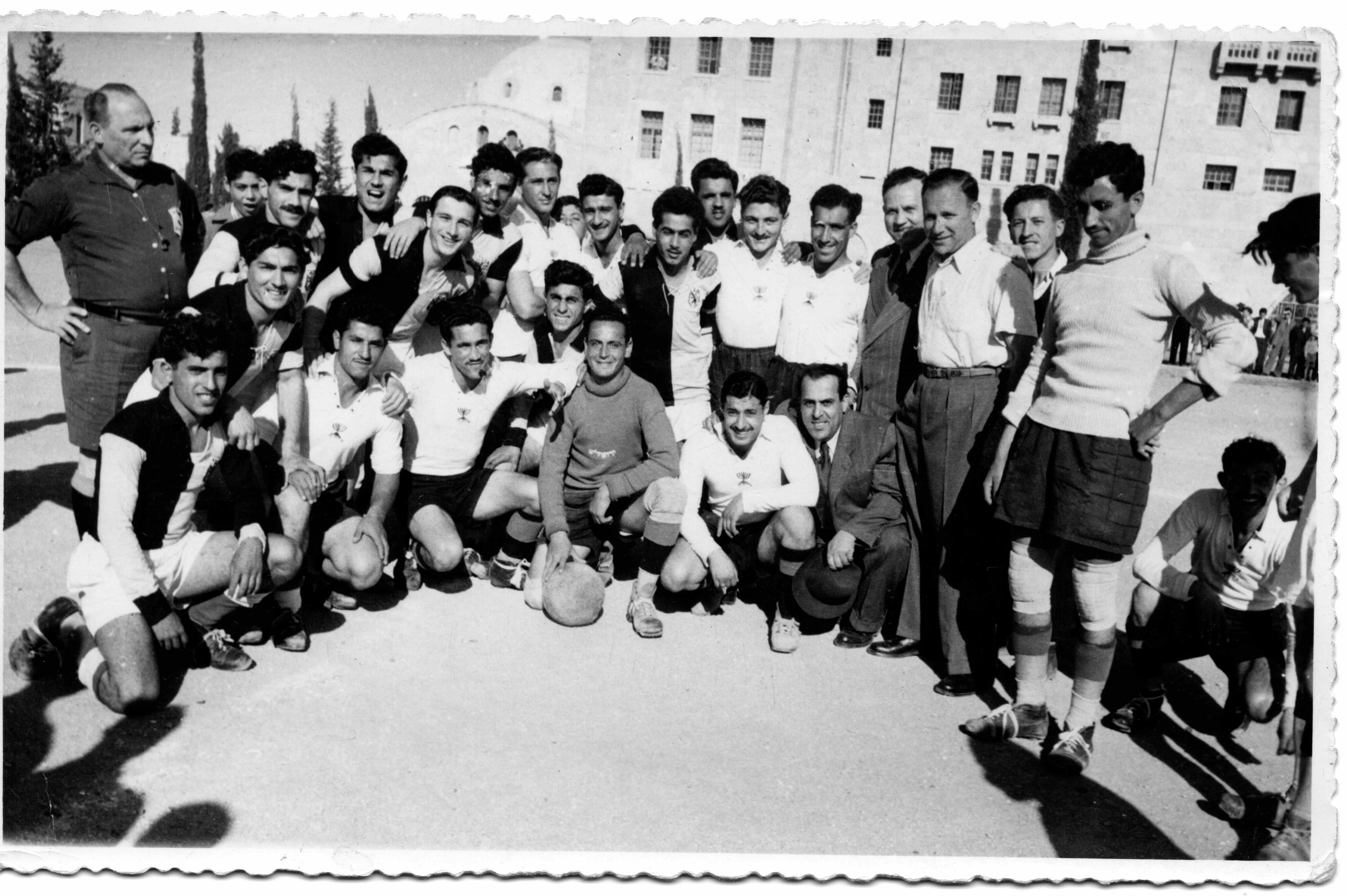 תמונה של אבי יוסף צברי במדיה של קבוצת מכבי ירושלים במשחק דרבי יום טורינו 1950 מול בית"ר ירושלים